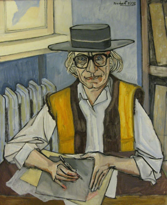 "Selbstbildnis" von Hans Neubert (2003, Öl auf Leinwand, 105 x 86 cm)